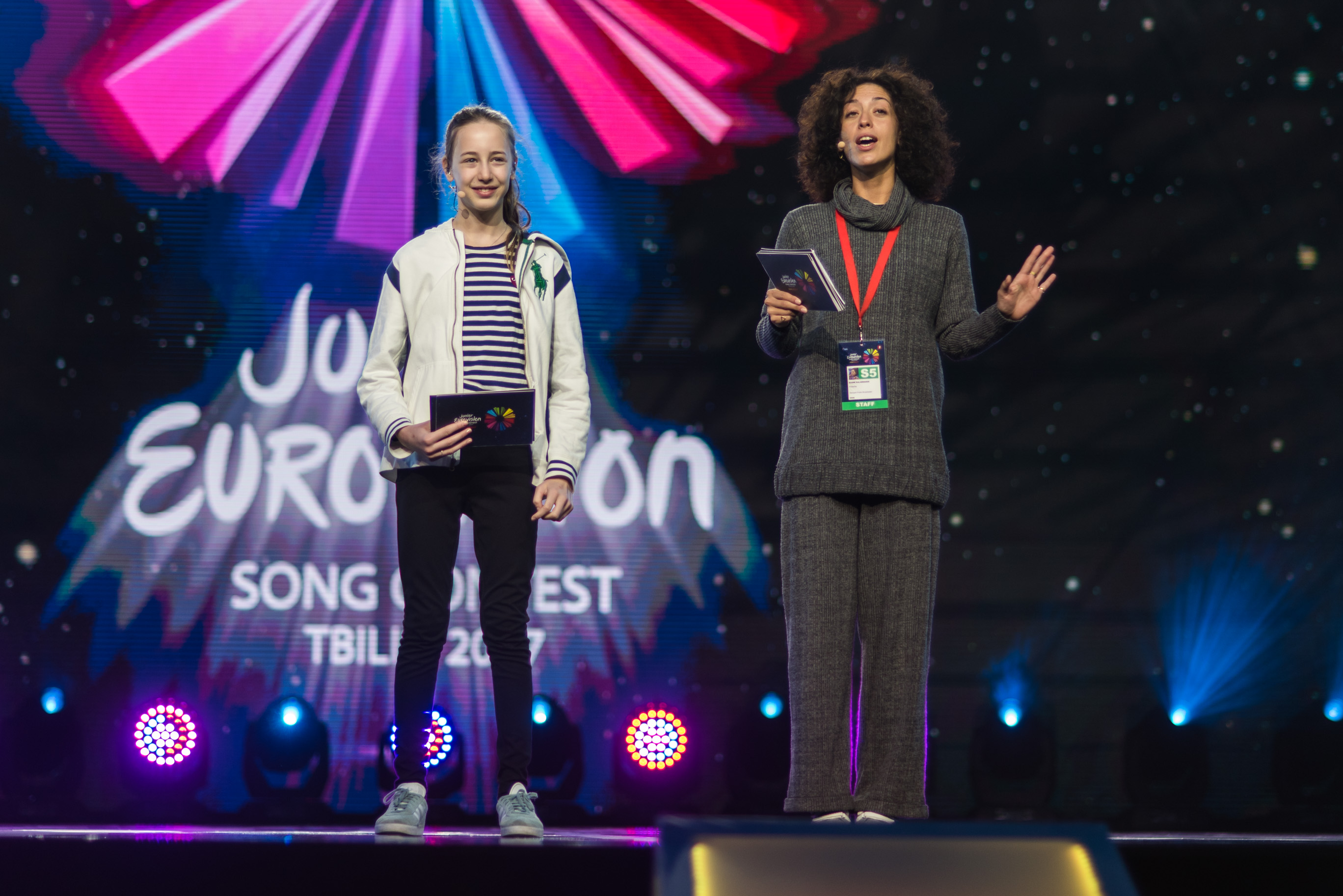 Лизи Джапаридзе и Хелен Каландадзе на генеральной репетиции Детского Евровидения 2017